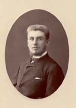 Christian Cloos (1863-1941), konsul og købmand i Frederikshavn.